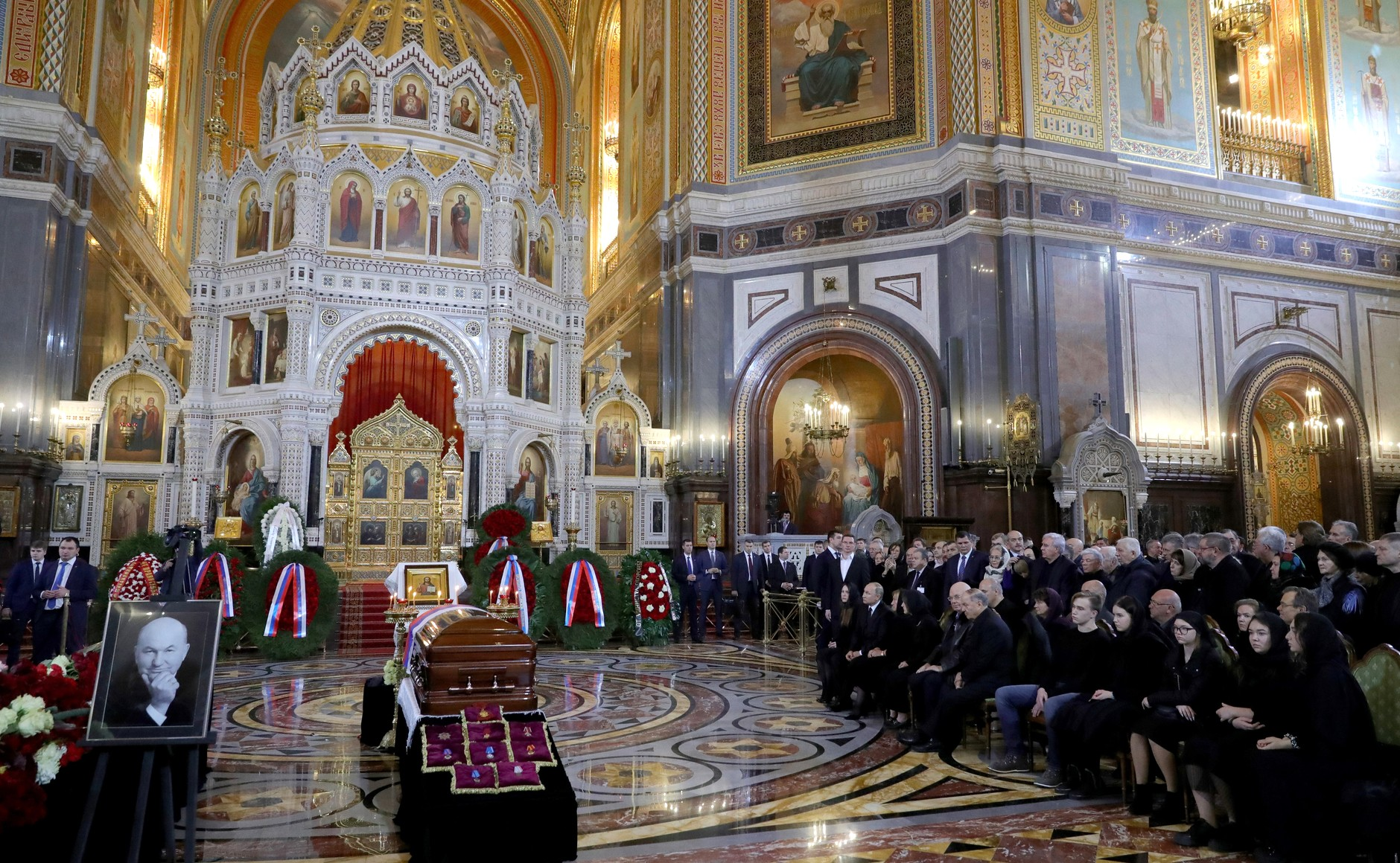 На церемонии прощания с бывшим мэром Москвы Юрием Лужковым в храме Христа Спасителя